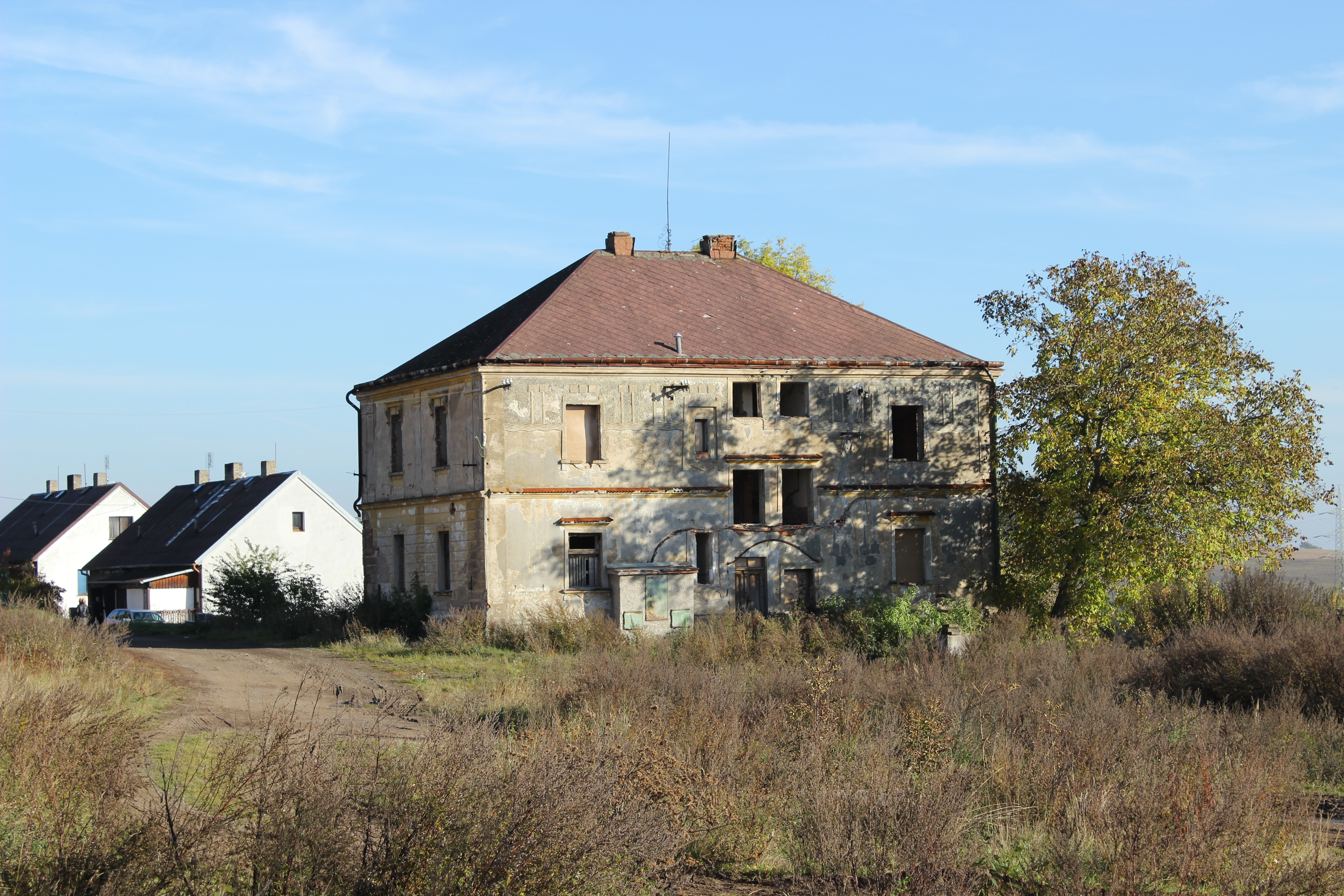 Zámek v budově, části Verušiček.